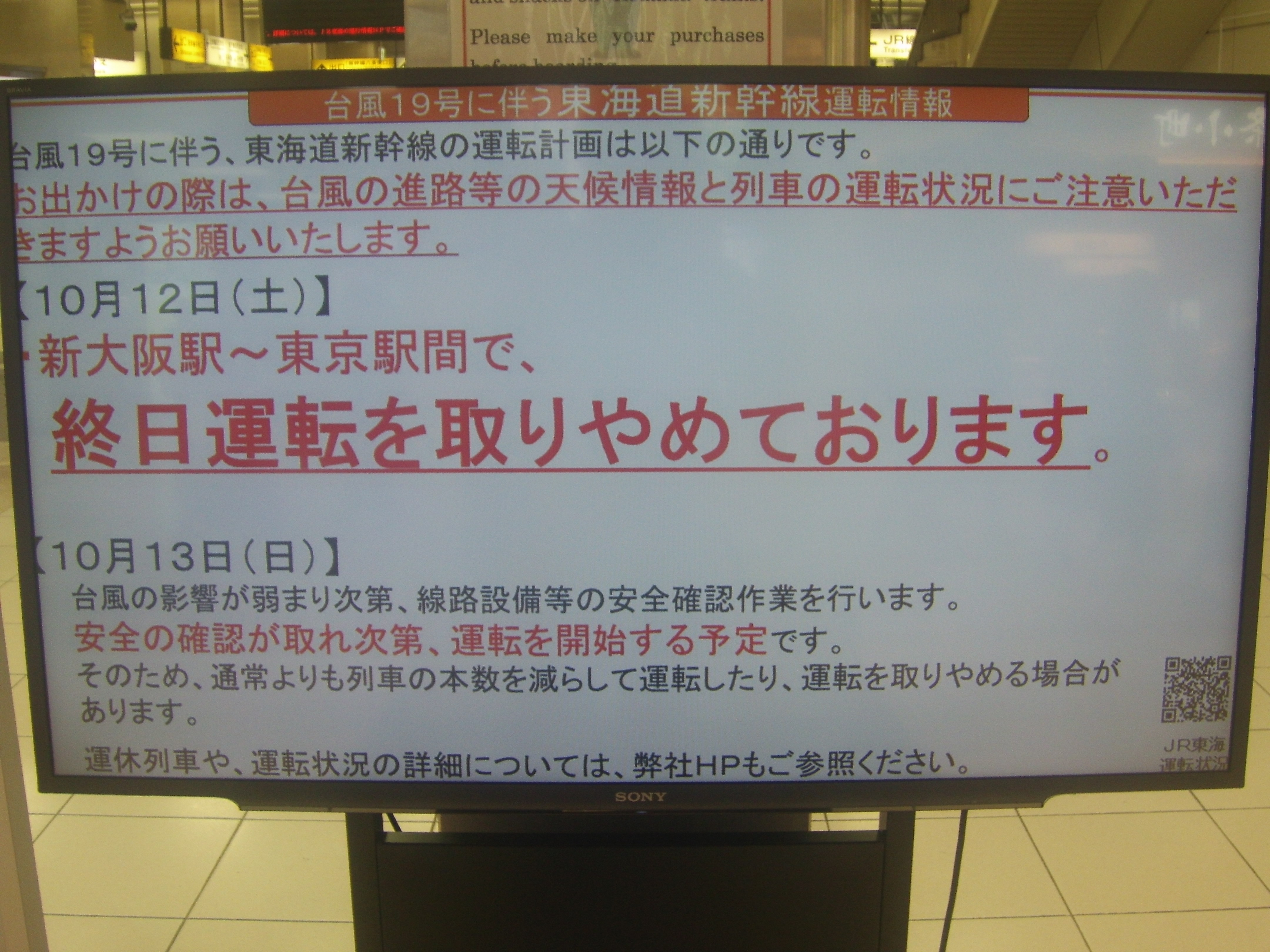 令和元年10月12日に日本列島を襲った台風19号による東海道新幹線の計画運休告知